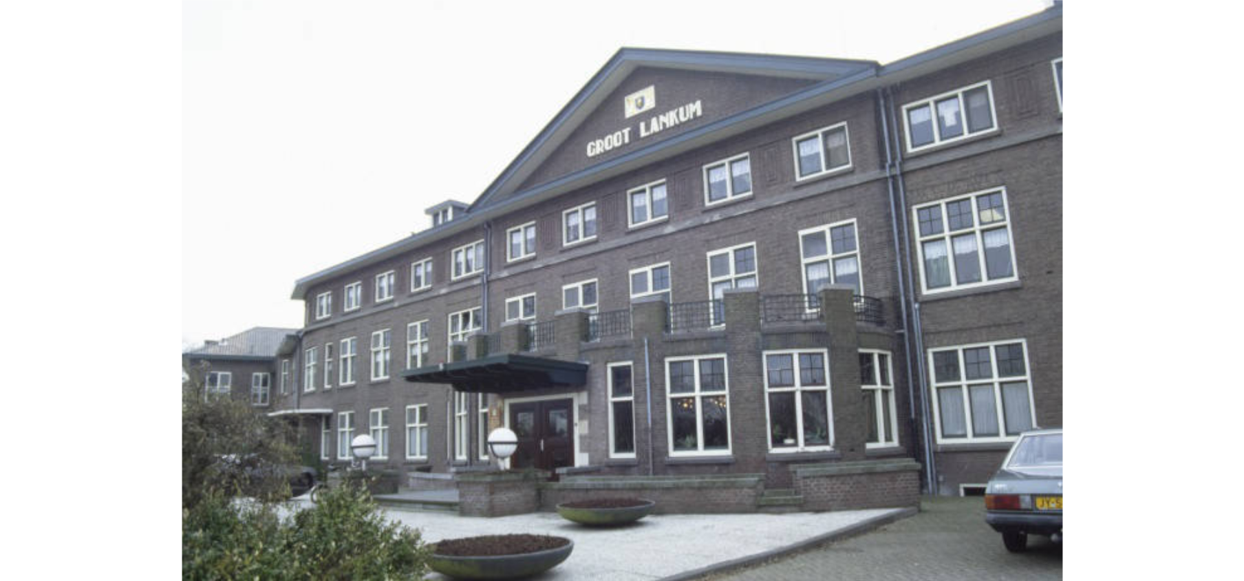 Franeker ; Harlingerweg ; Groot Lankum ; Openbaar gebouw ; volledig (exterieur) ; Voormalig hoofdgebouw van het Psychiatrisch Ziekenhuis, tegenwoordig verbouwd tot woonappartementen onder de naam Kening State. Rijksmonument 512680.